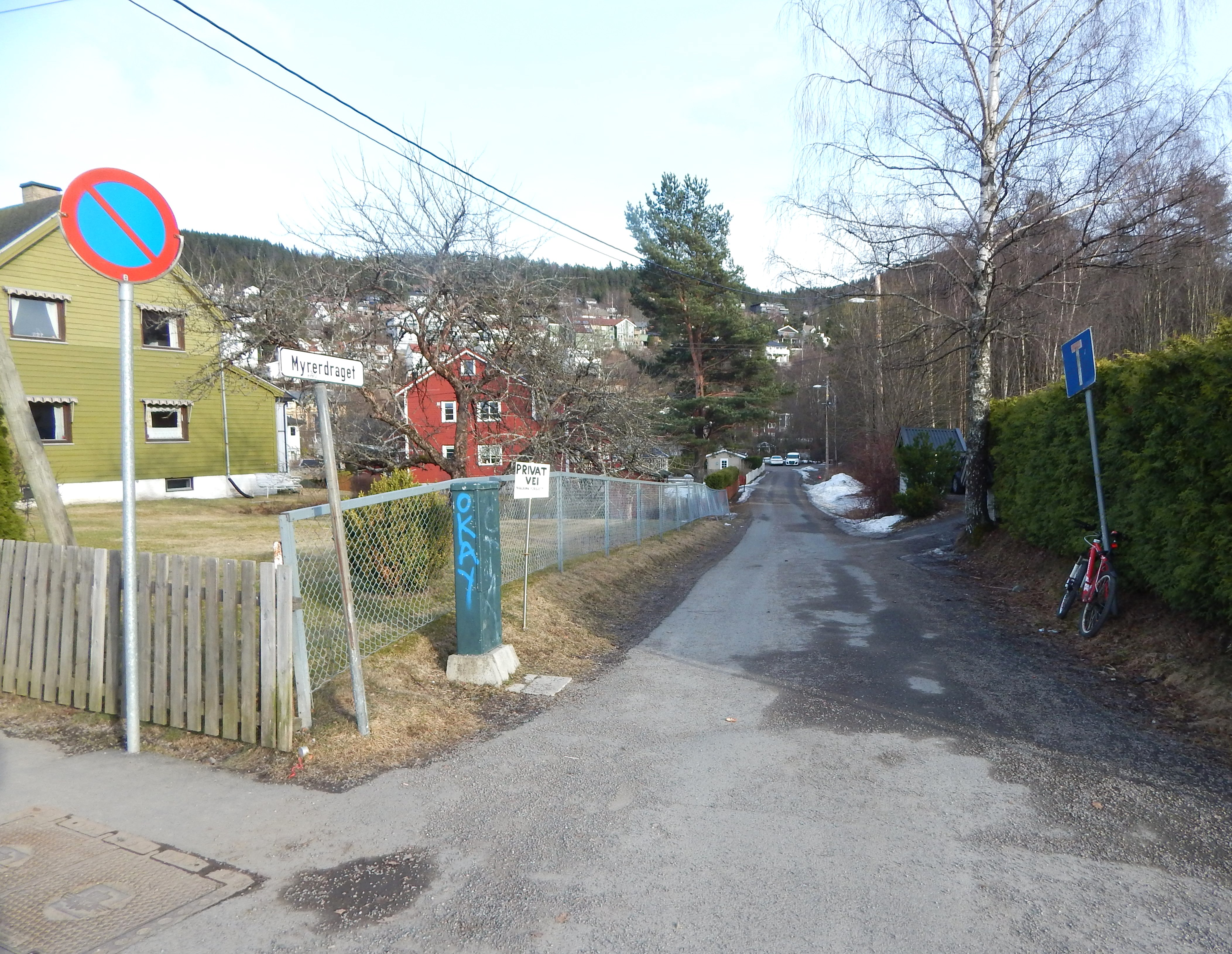 Myrerdraget sett fra Midtoddveien